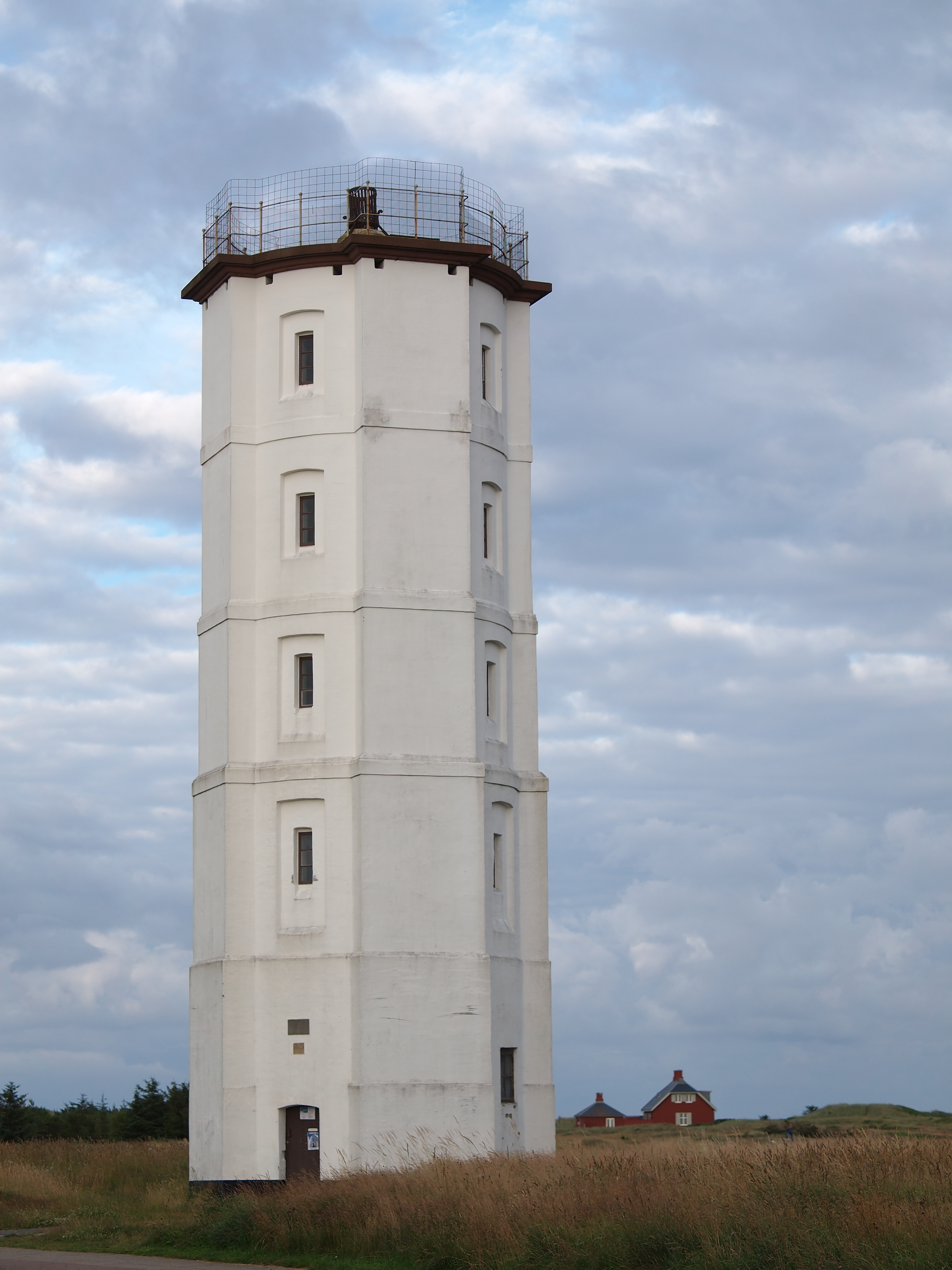 der alte weiße Leuchtturm in Skagen, Nordjüdland, Dänemark, nicht mehr in Betrieb, auf dem Dach der Korb, in dem früher das Leuchtfeuer abgebrannt wurde